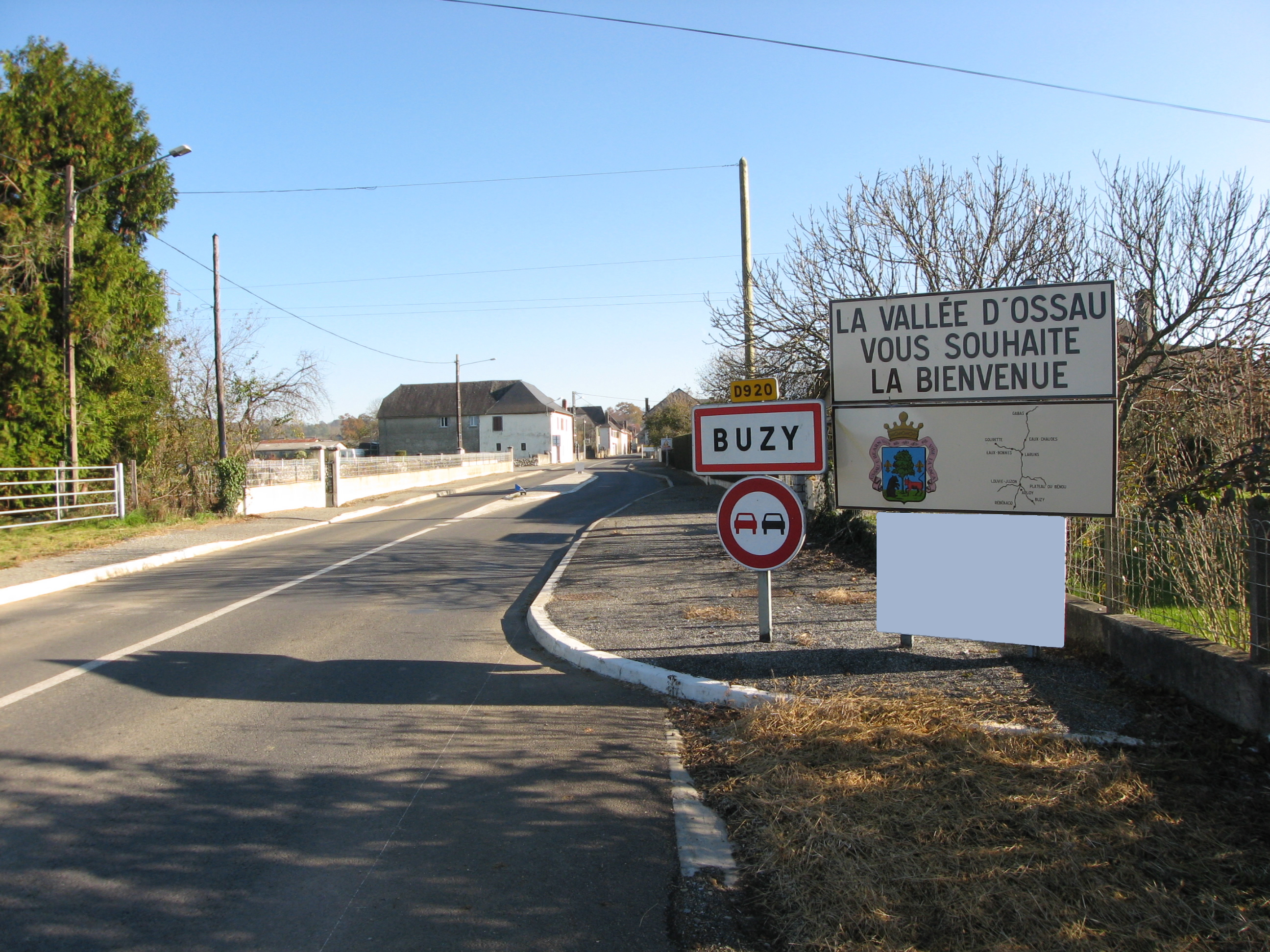 Entrée du village de Buzy (Pyrénées-Atlantiques) (Pyrénées).